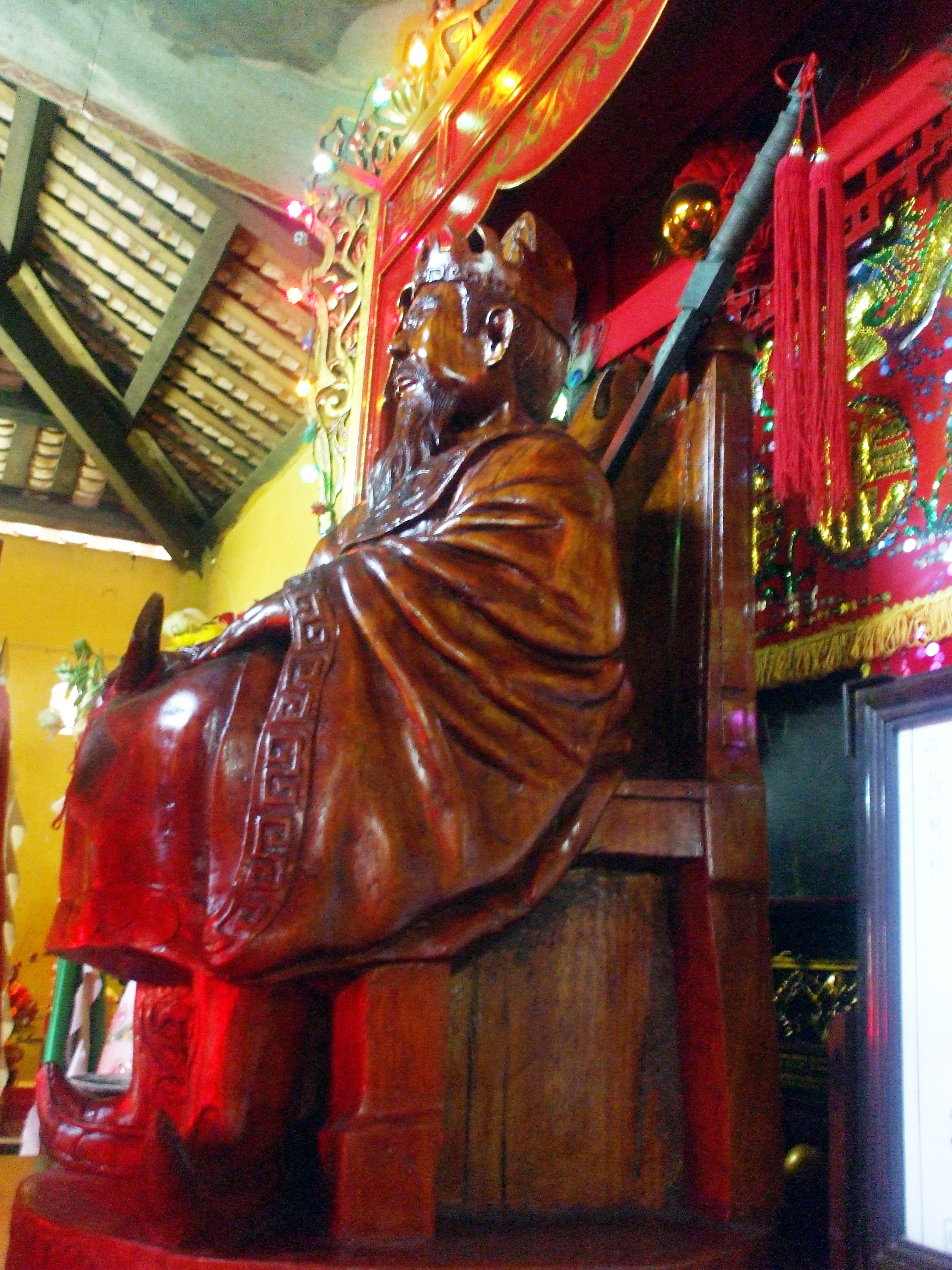 Tượng Thống chế Điều bát trong đền thờ ông ở Trà Ôn (Vĩnh Long, Việt Nam).